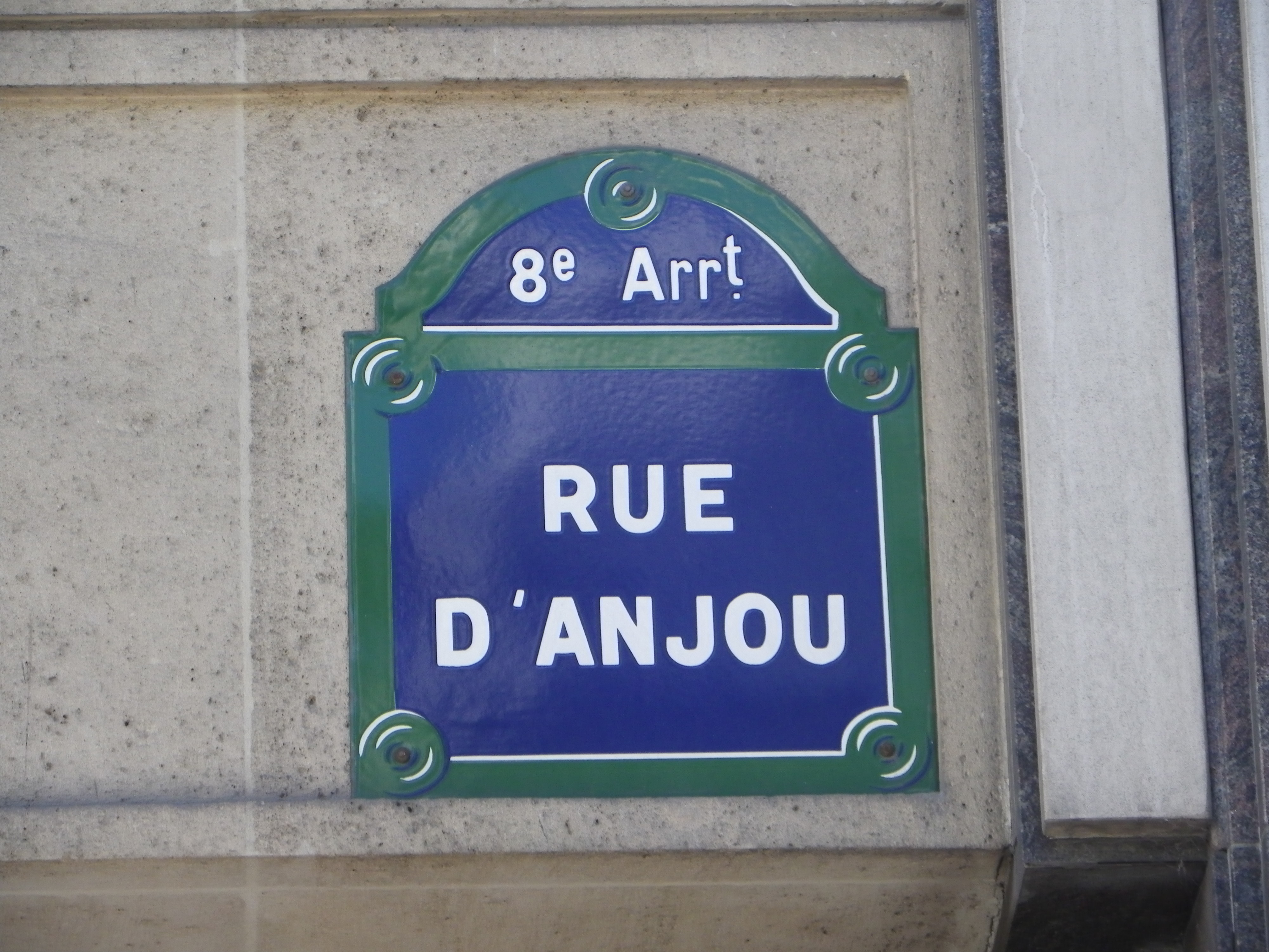 Plaque rue d'Anjou à Paris